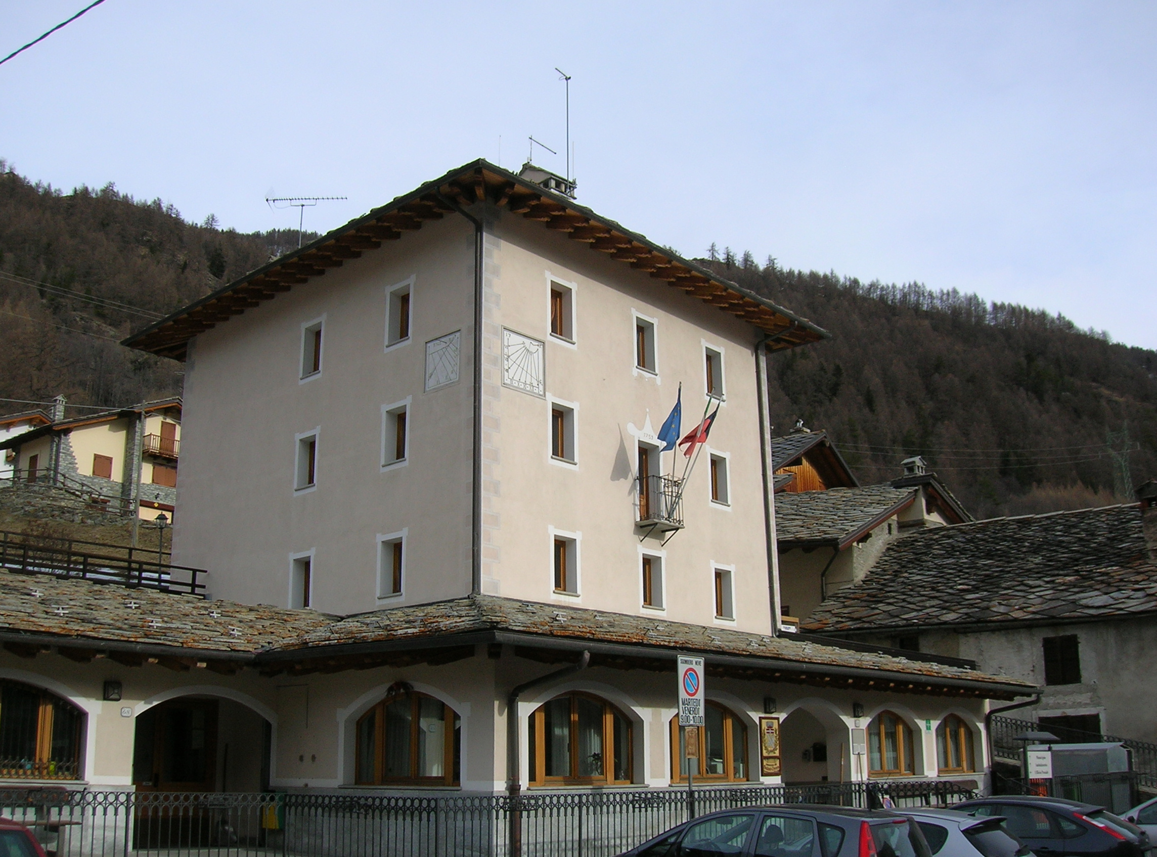 municipio di Saint-Oyen (Italy)